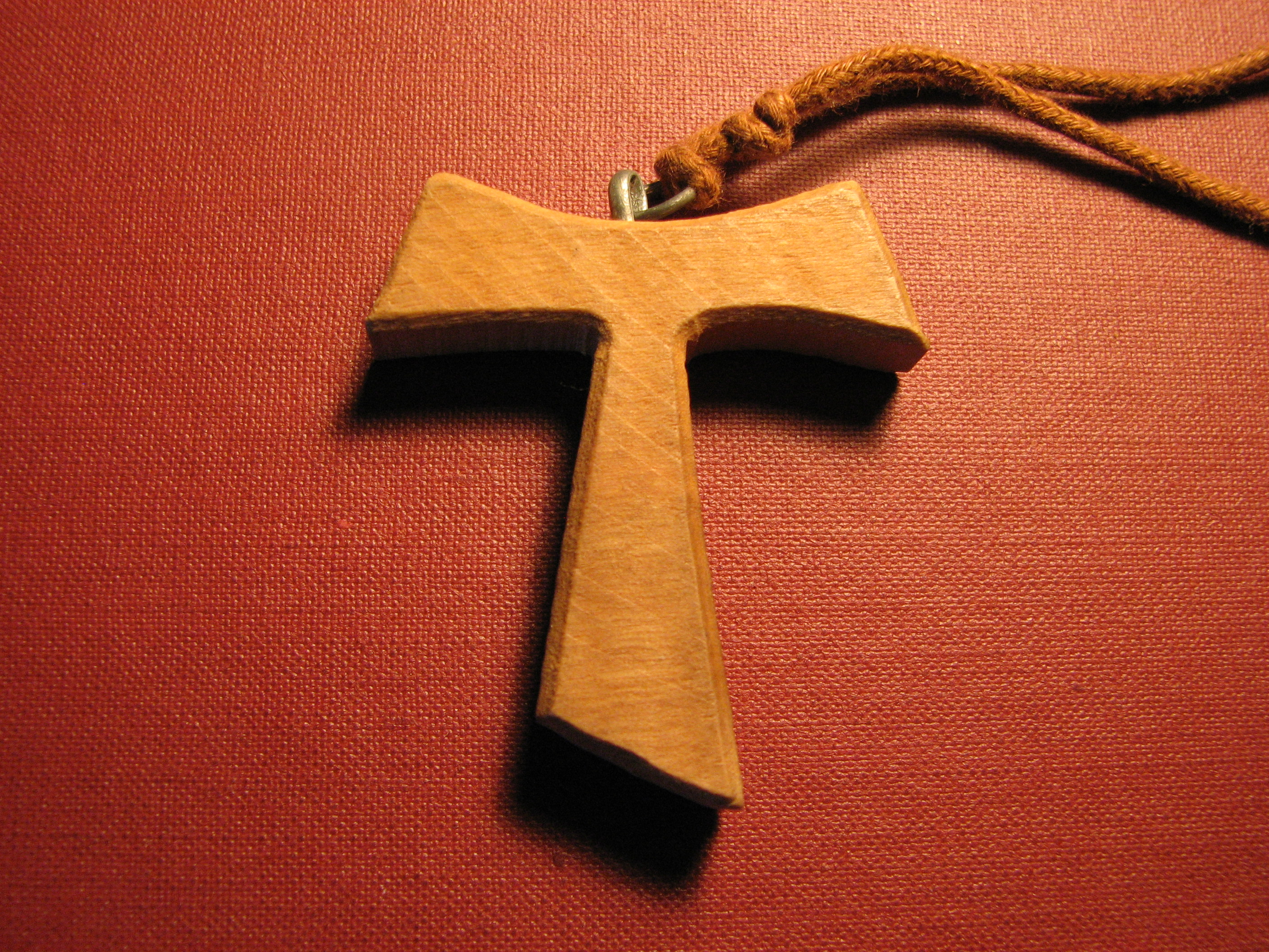 Franciscan Tau